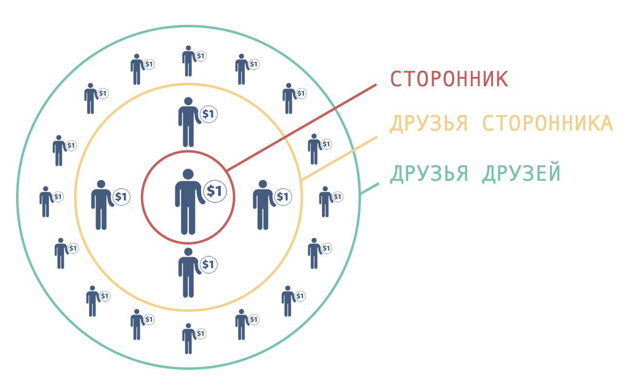 Сетевая структура взаимодействия при волонтерском фандрайзинге